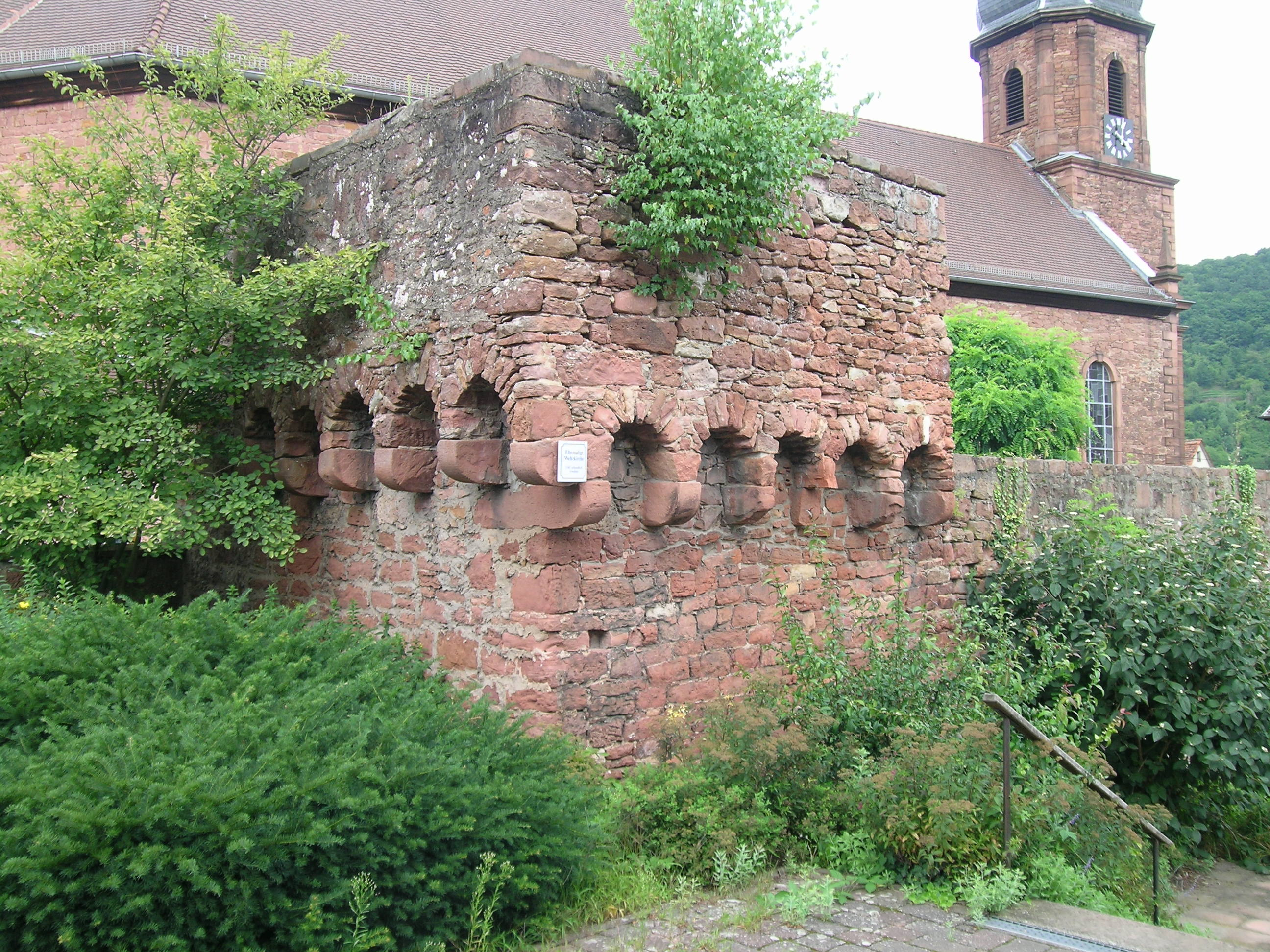 Katholische Pfarrkirche St. Maria Magdalena in Klingenberg am Main (Ortsteil Trennfurt), Trennfurter Straße 76, Reste der alten Wehrkirche, Akten Nr. D-6-76-134-78